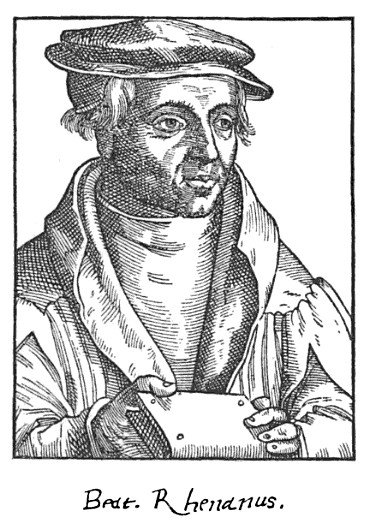 Briefwechsel des Beatus Rhenanus, Volume 1. Beatus Rhenanus, Karl Hartfelder. Teubner, 1886